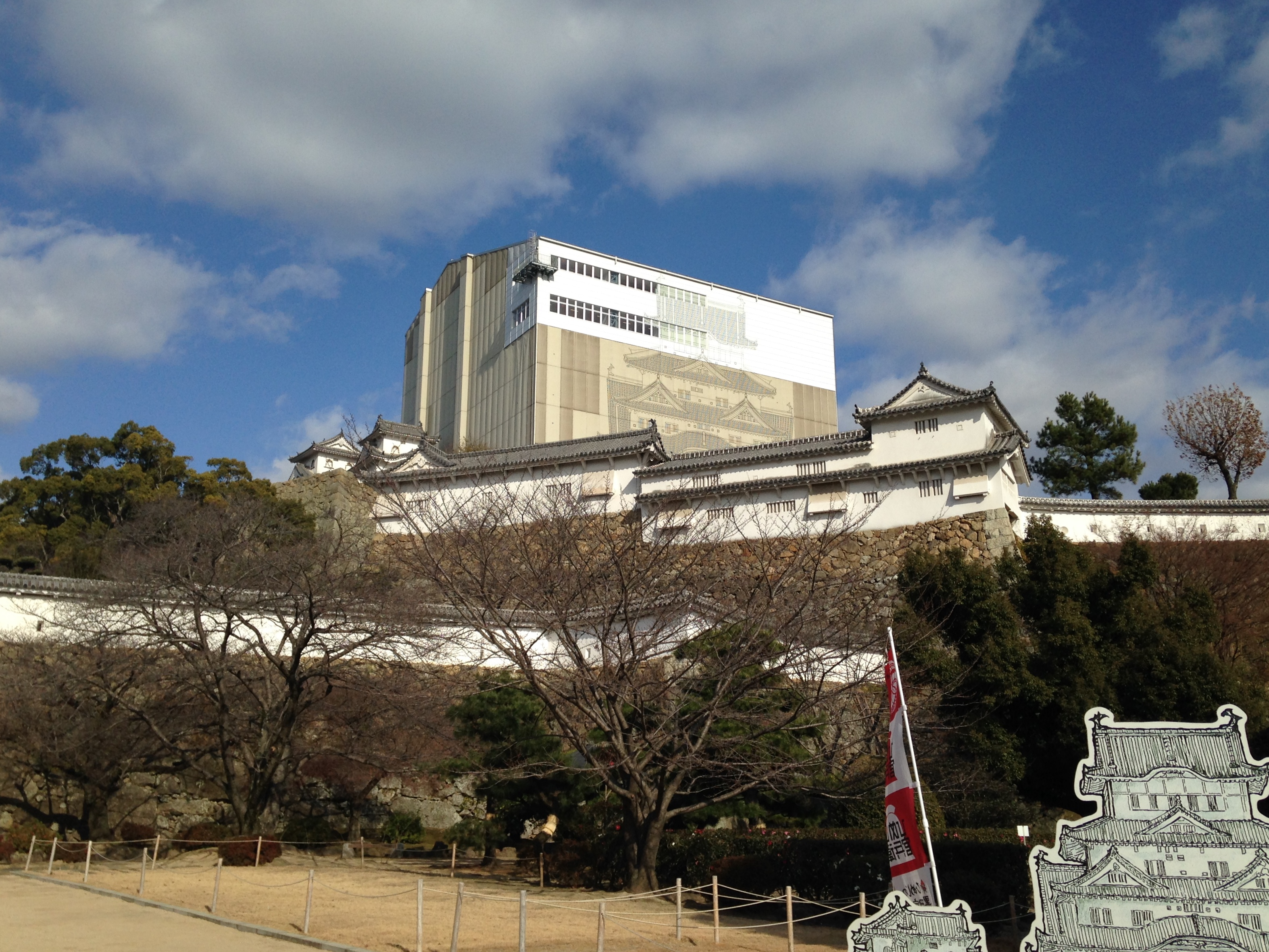 姫路城の天守閣(改修中)